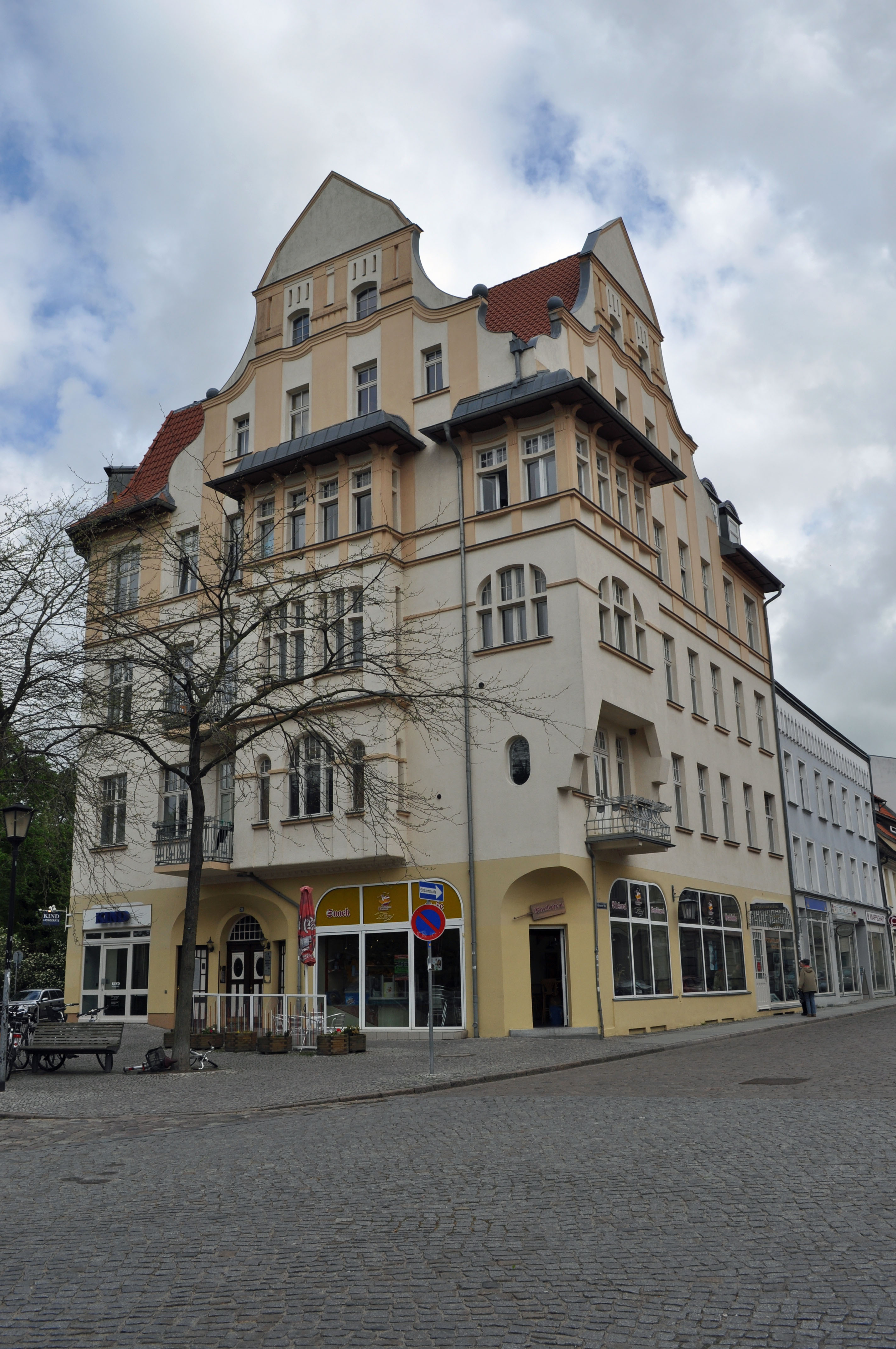 Gebäude in Stralsund, siehe Dateiname